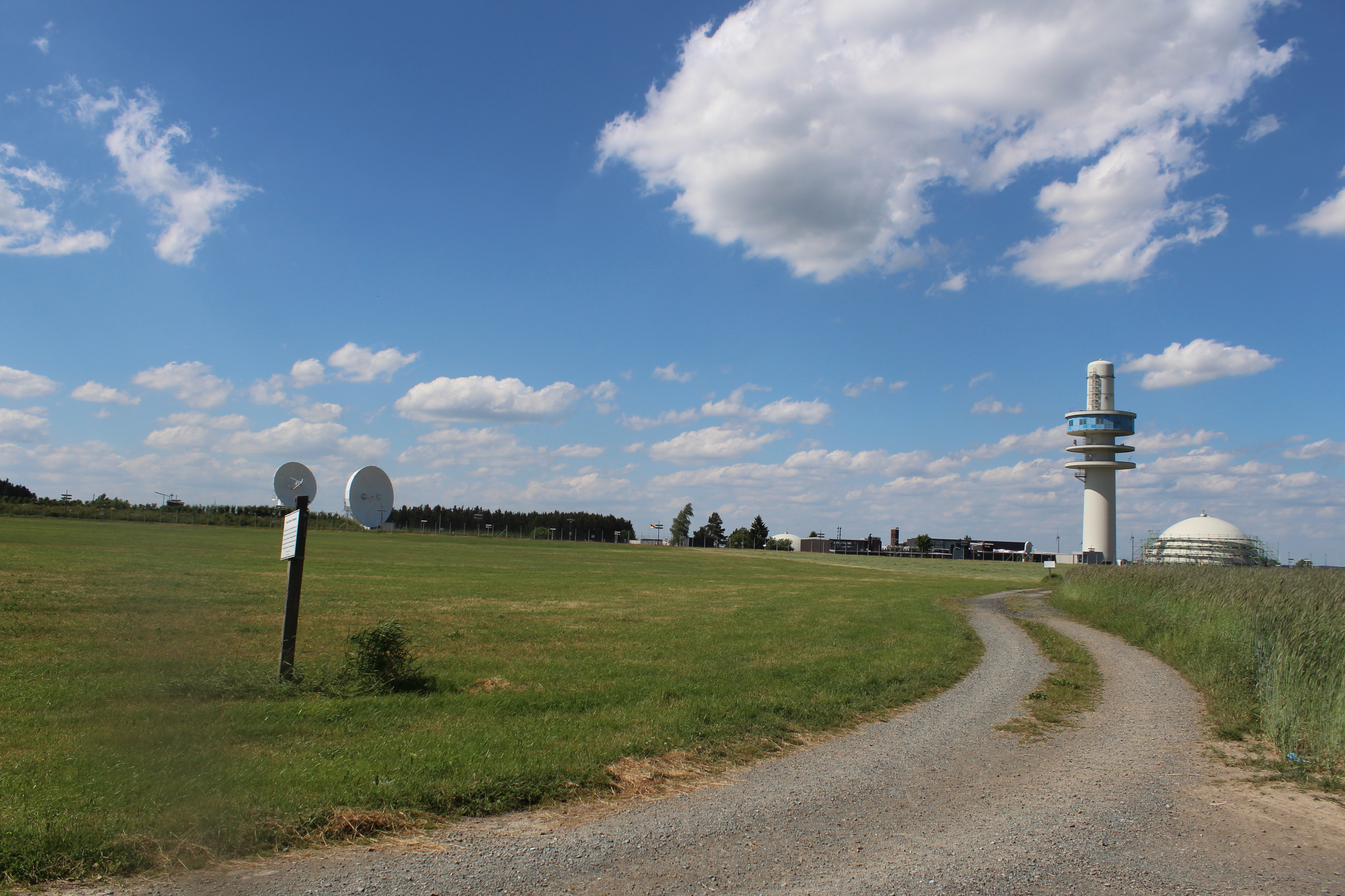 Abhörturm Hof